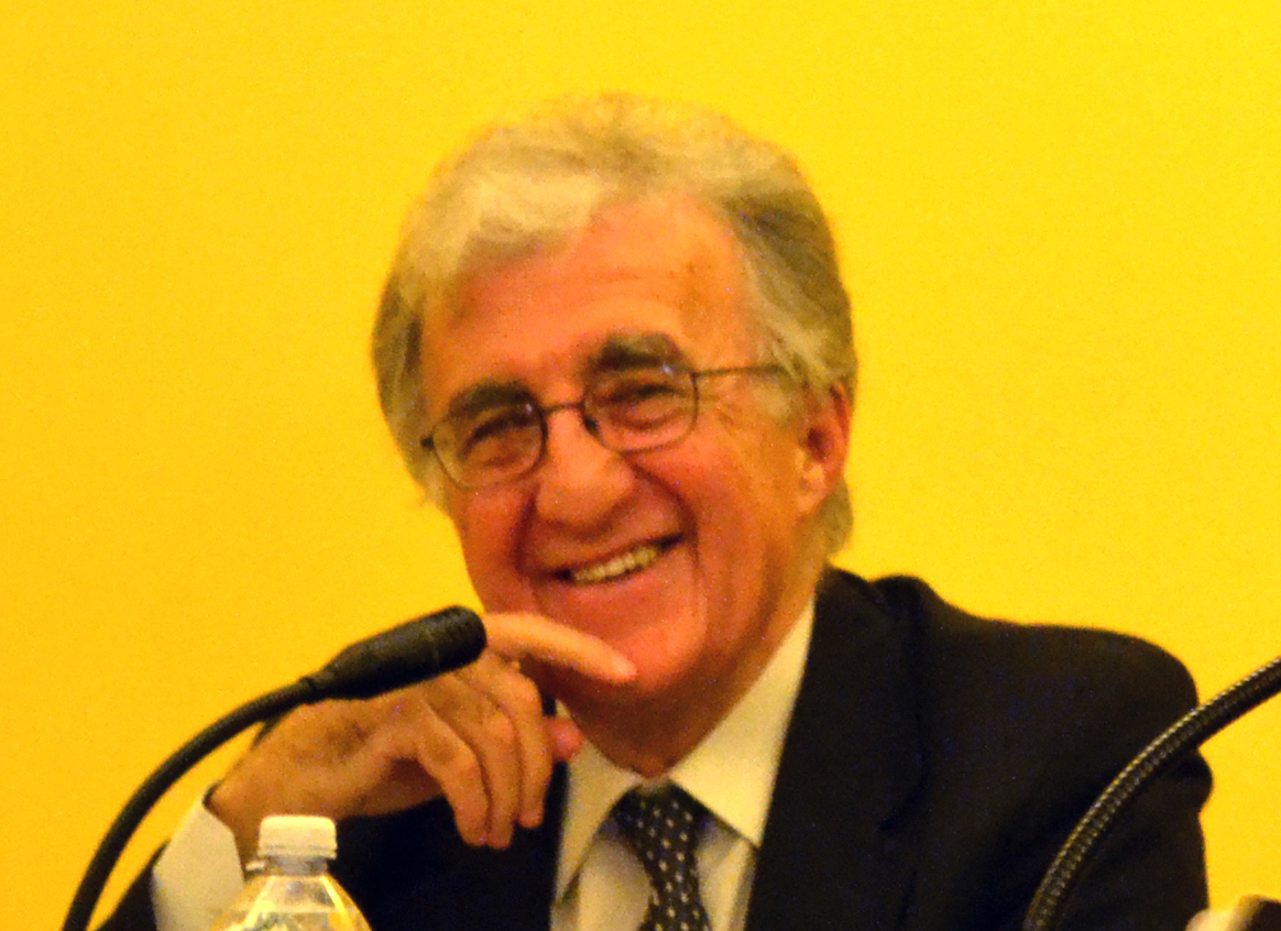 ritratto fotografico di Marcello Teodonio, durante il convegno di studi belliani